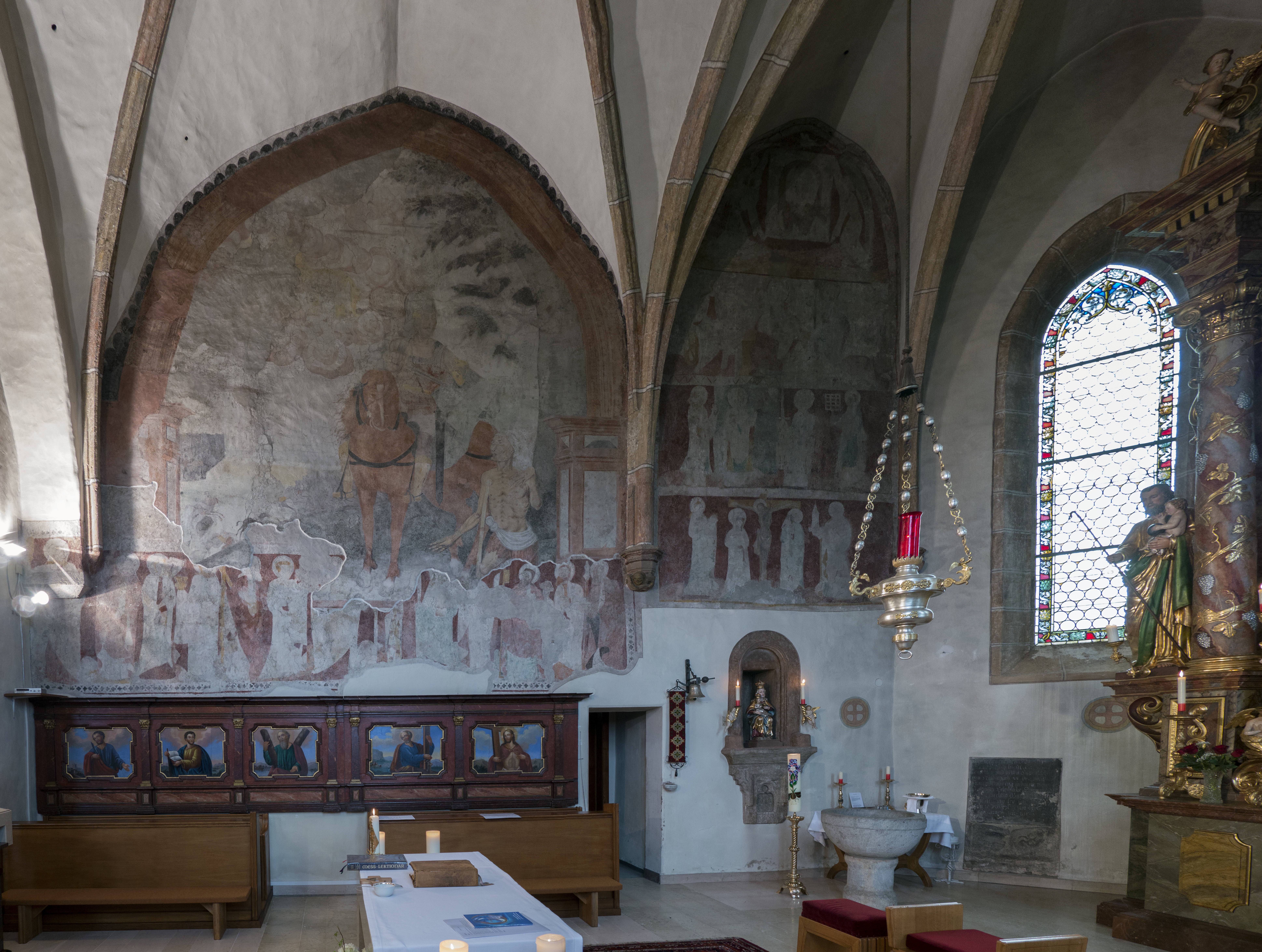 Kath. Pfarrkirche hl. Martin